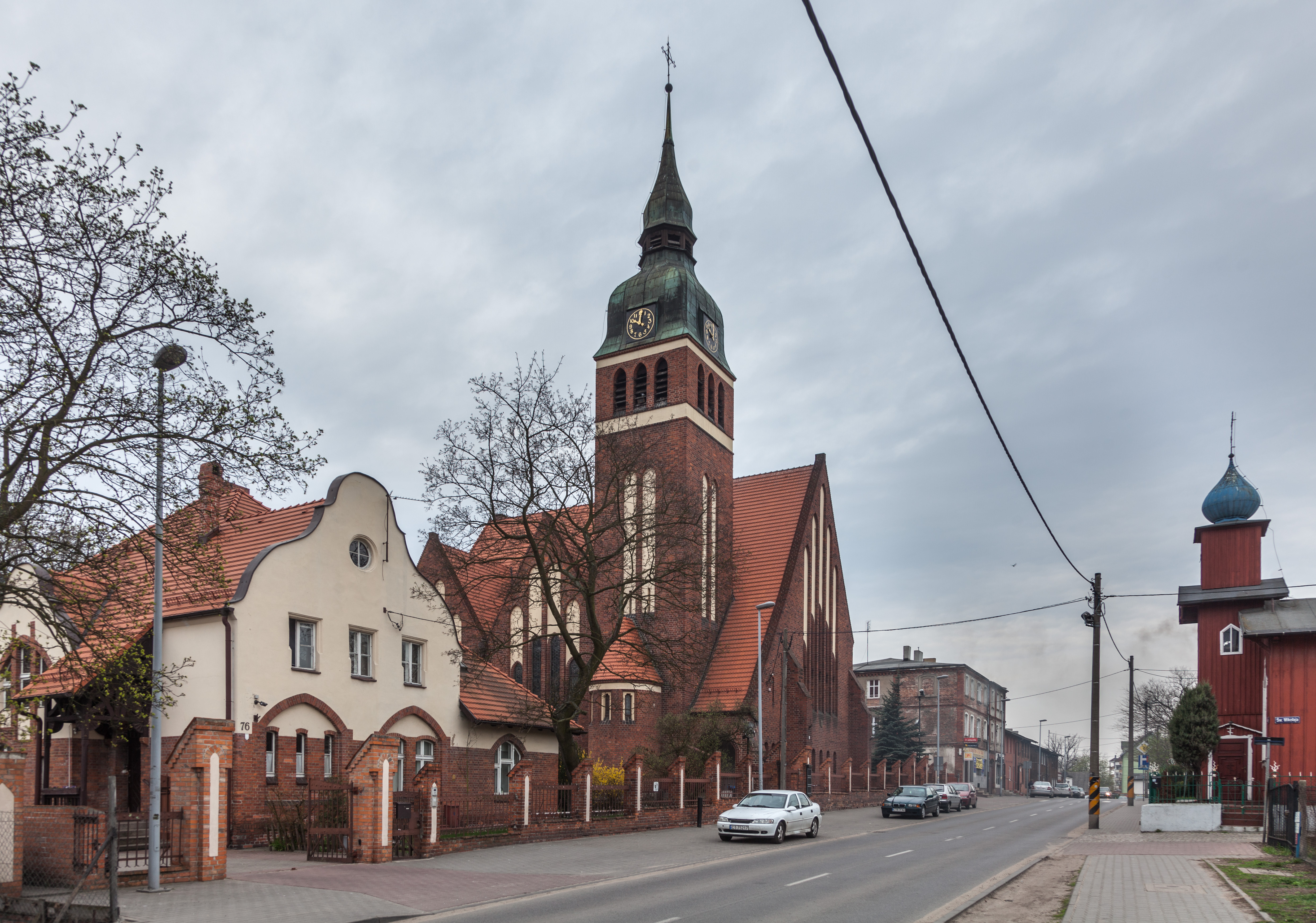 Ulica Podgórna w Toruniu. Po lewej zespół dawnego kościoła ewngelickiego św. Jerzego (ob. rzymskokatolicki pw. Matki Boskiej Zwycięskiej i św. Jerzego) wraz z plebanią, po prawej cerkiew prawosławna pw. św. Mikołaja.